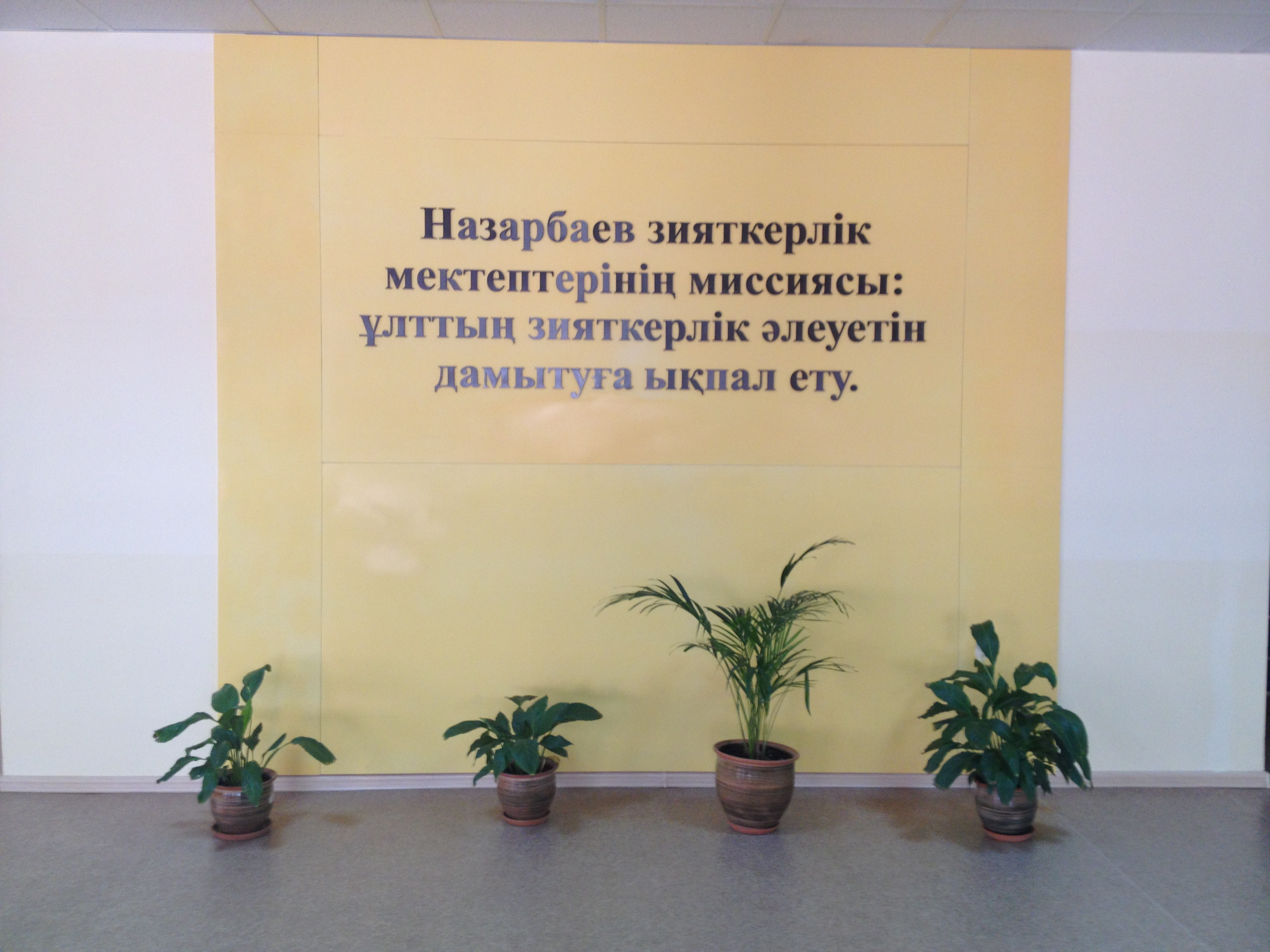 Мақсат